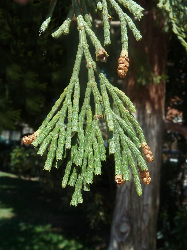 Calocedrus decurrens (Cedro de incienso): Conos masculinos y cono femenino. - Pza de Colón, Madrid (España).